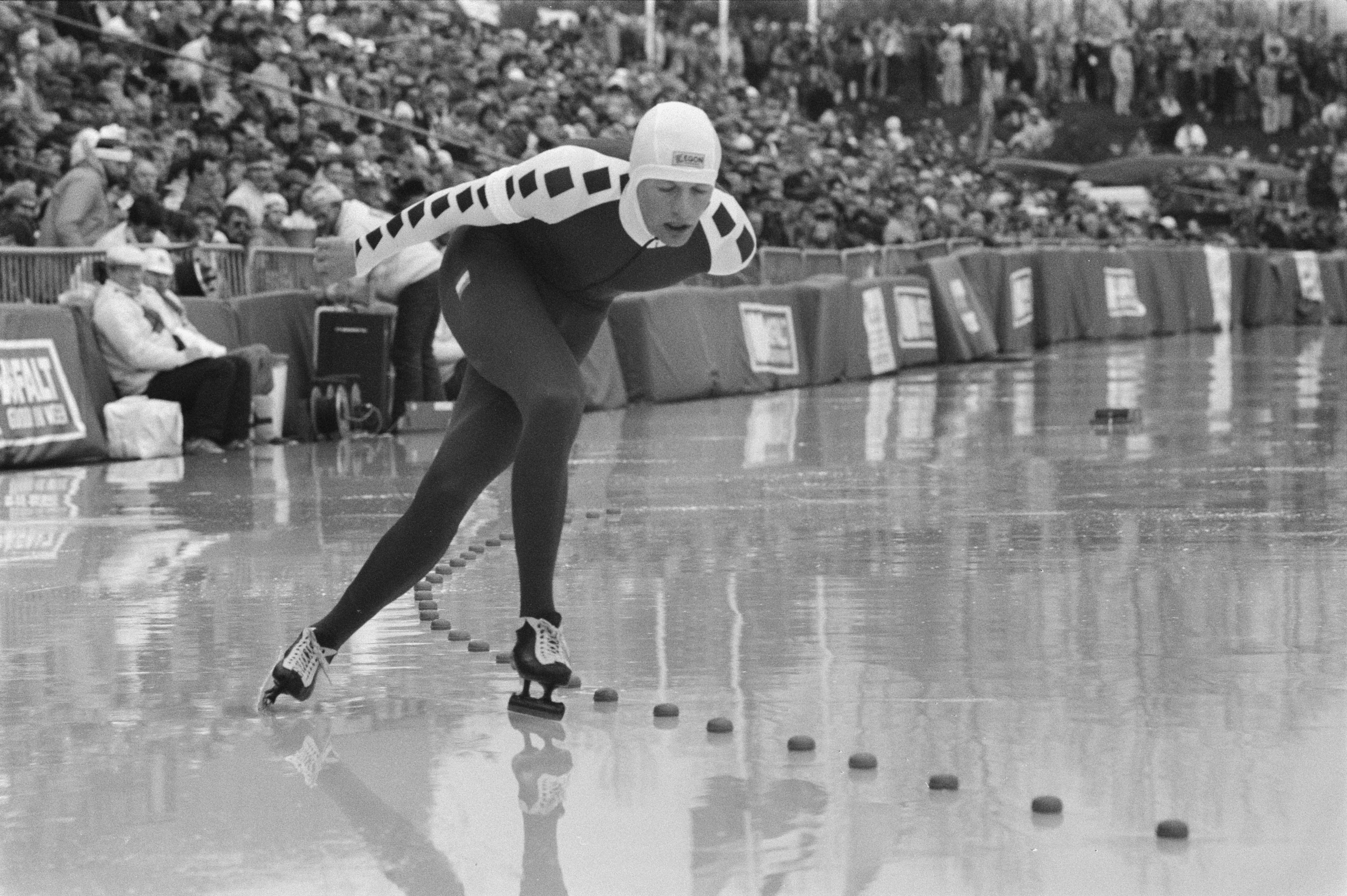 Collectie / Archief : Fotocollectie Anefo Reportage / Serie : [ onbekend ] Beschrijving : EK schaatsen heren in Den Haag ; Gerard Kemkers in actie Datum : 24 januari 1988 Locatie : Den Haag, Zuid-Holland Trefwoorden : SCHAATSEN, sport Persoonsnaam : Gerard Kemkers Fotograaf : Croes, Rob C. / Anefo Auteursrechthebbende : Nationaal Archief Materiaalsoort : Negatief (zwart/wit) Nummer archiefinventaris : bekijk toegang 2.24.01.05 Bestanddeelnummer : 934-1751